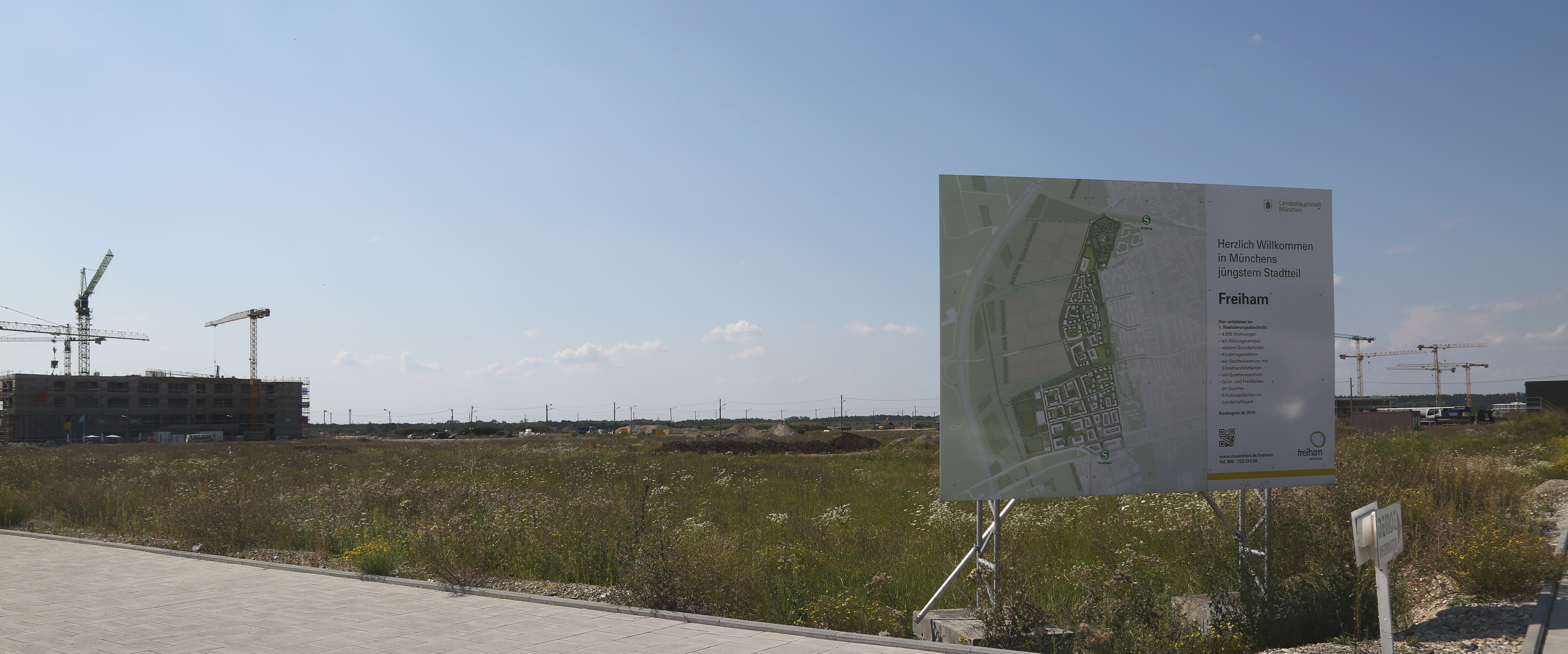 München-Freiham: Ein Stadtteil im Bau. Das Bild zeigt das künftige Wohngebiet nördlich der Bodenseestraße. Im Hintergrund das entstehende Schulzentrum.